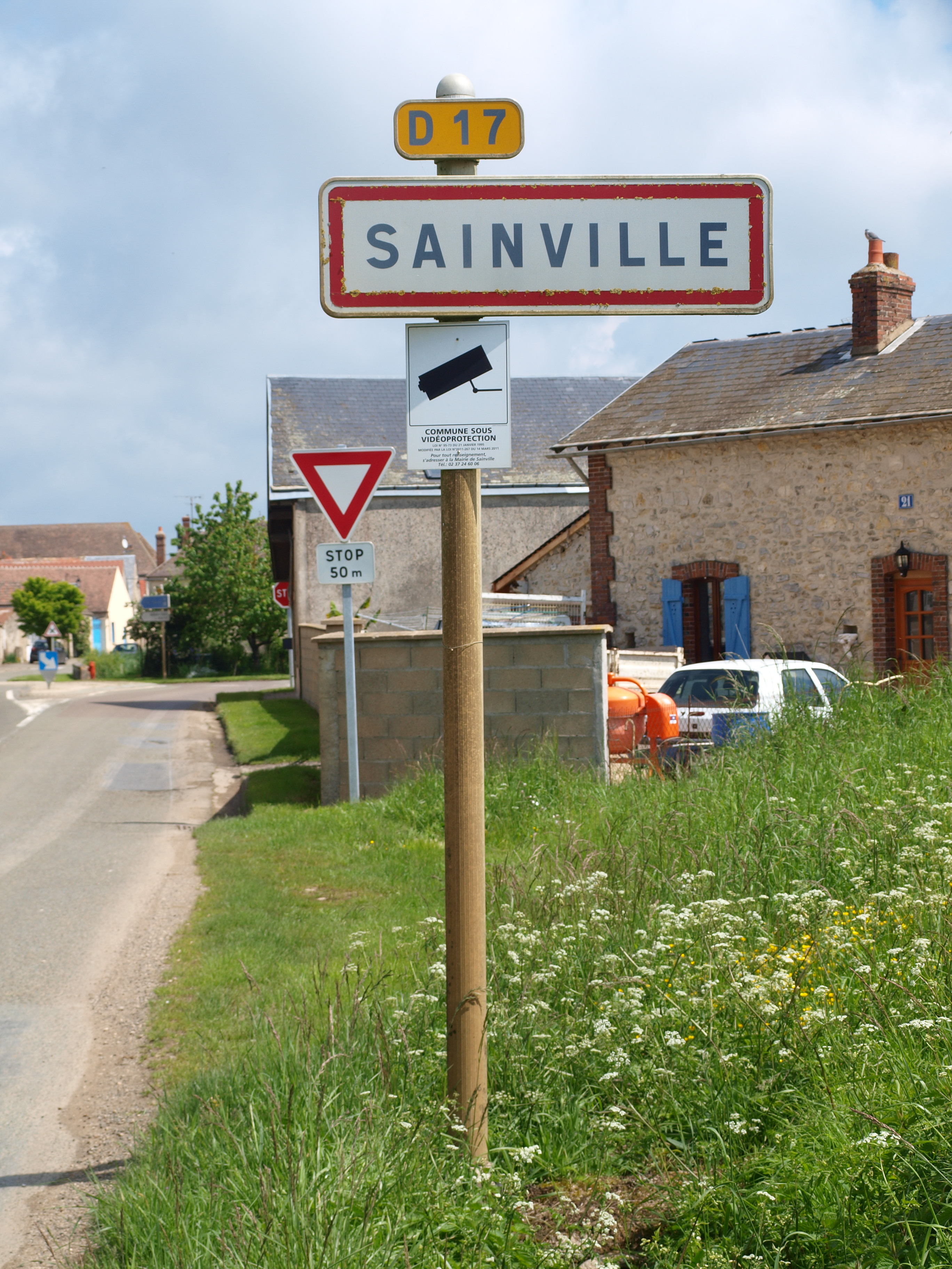 Sainville